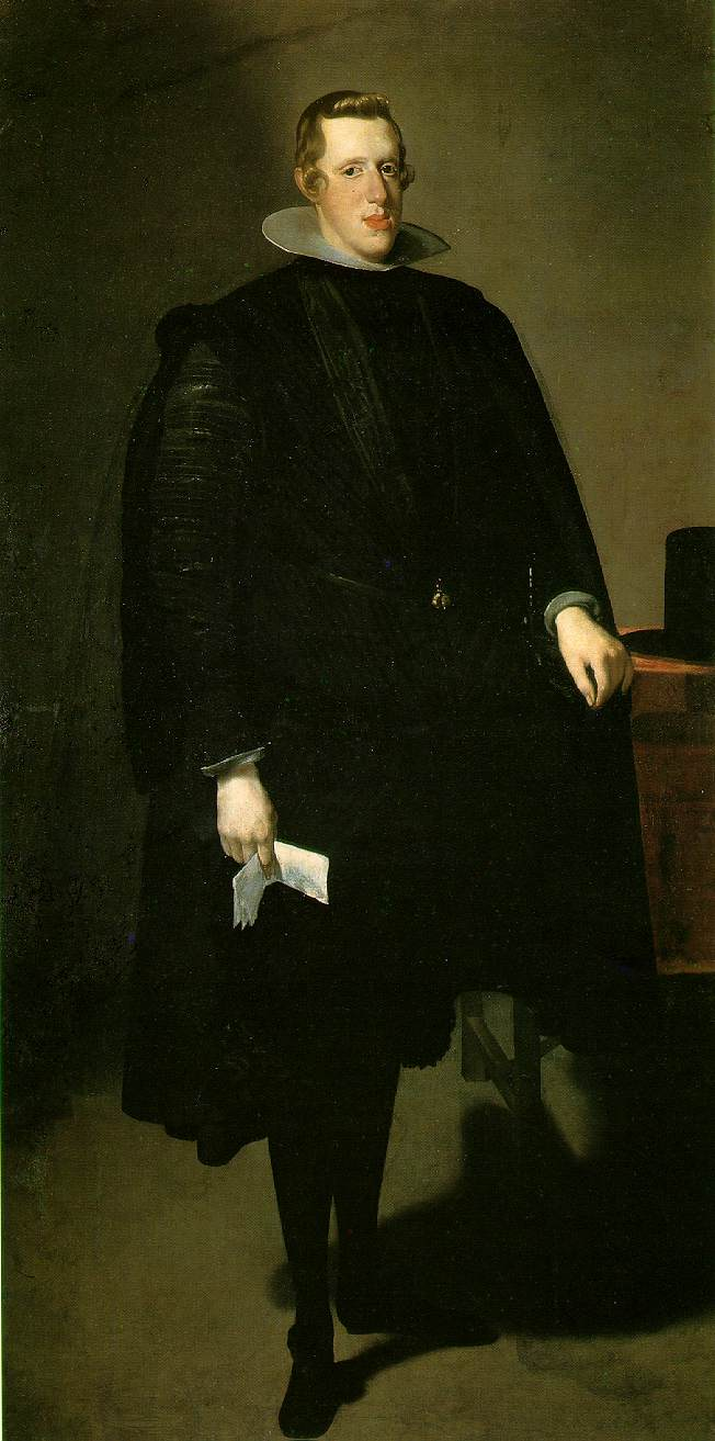 Retrato del rey Felipe IV de España (1601-1665), que fue hijo del rey Felipe III de España y de la reina Margarita de Austria.